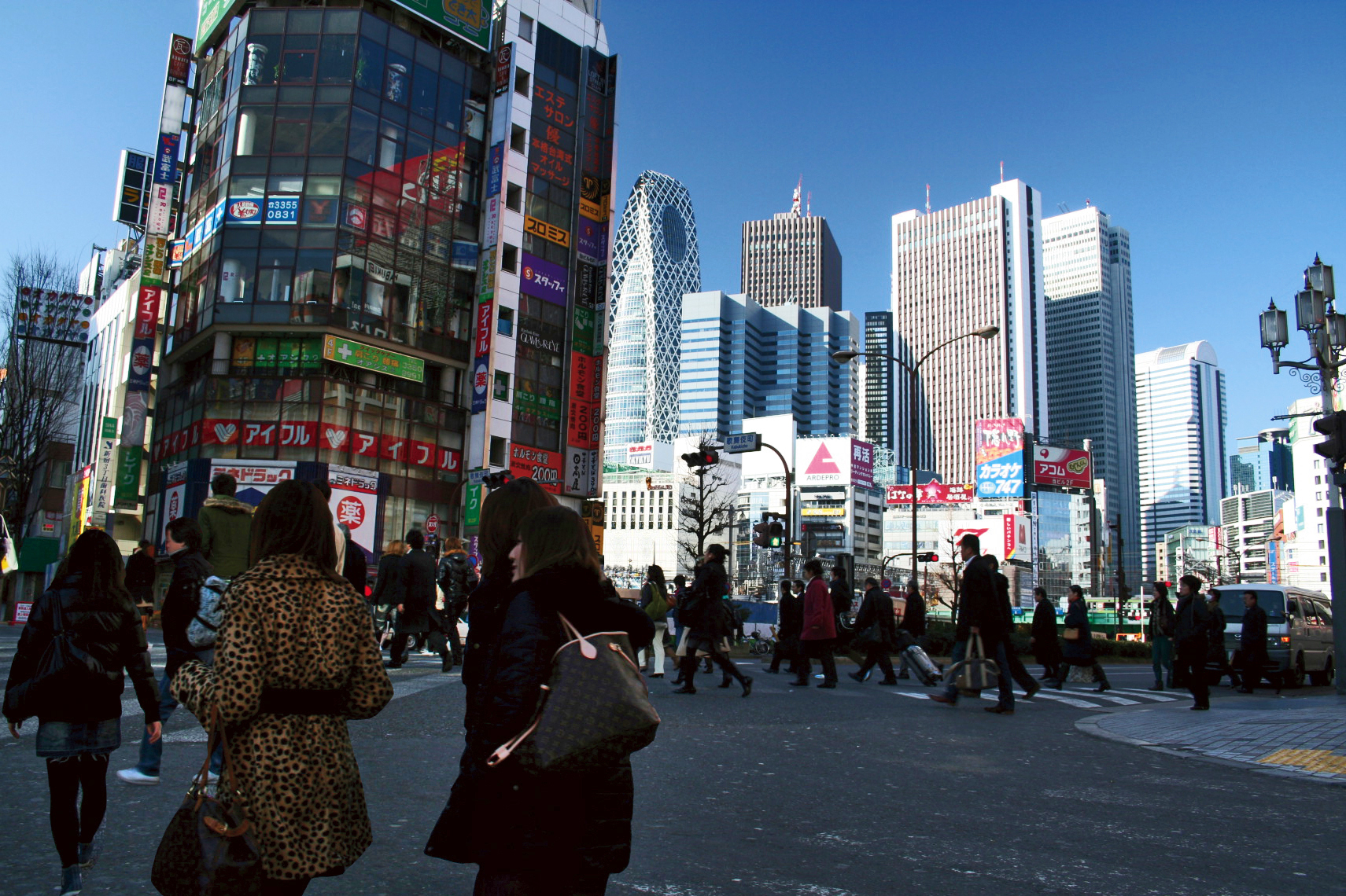 新宿の風景